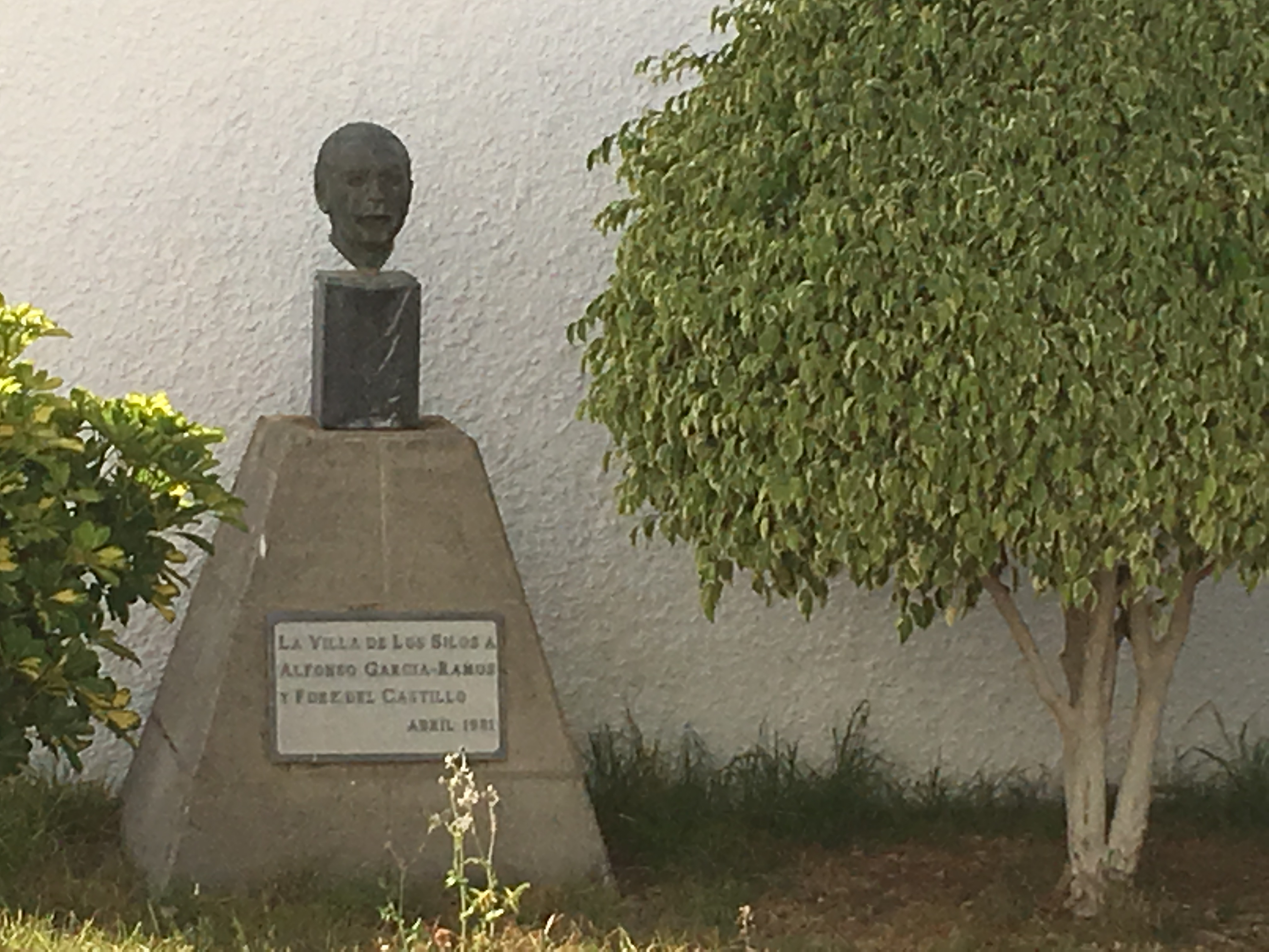 Busto en homenaje a Alfonso García-Ramos en el Auditorio Municipal de Los Silos. (Escultura realizada por Fernando Garcíarramos).